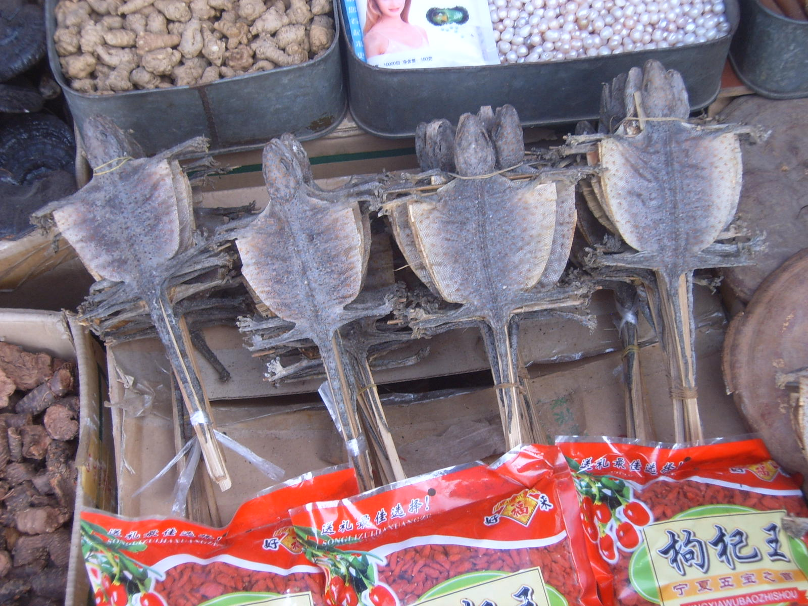 Some elements for Médecine chinoise in Xi'an